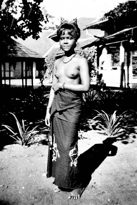 Repronegatief. Een huwbaar meisje uit de middenklasse (kabisu) te Praing Liu, Oost-Sumba met een haarkam (hai kara jangga)